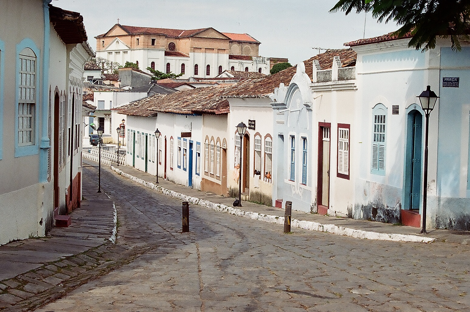 Goiás, GO: conjunto arquitetônico e urbanístico